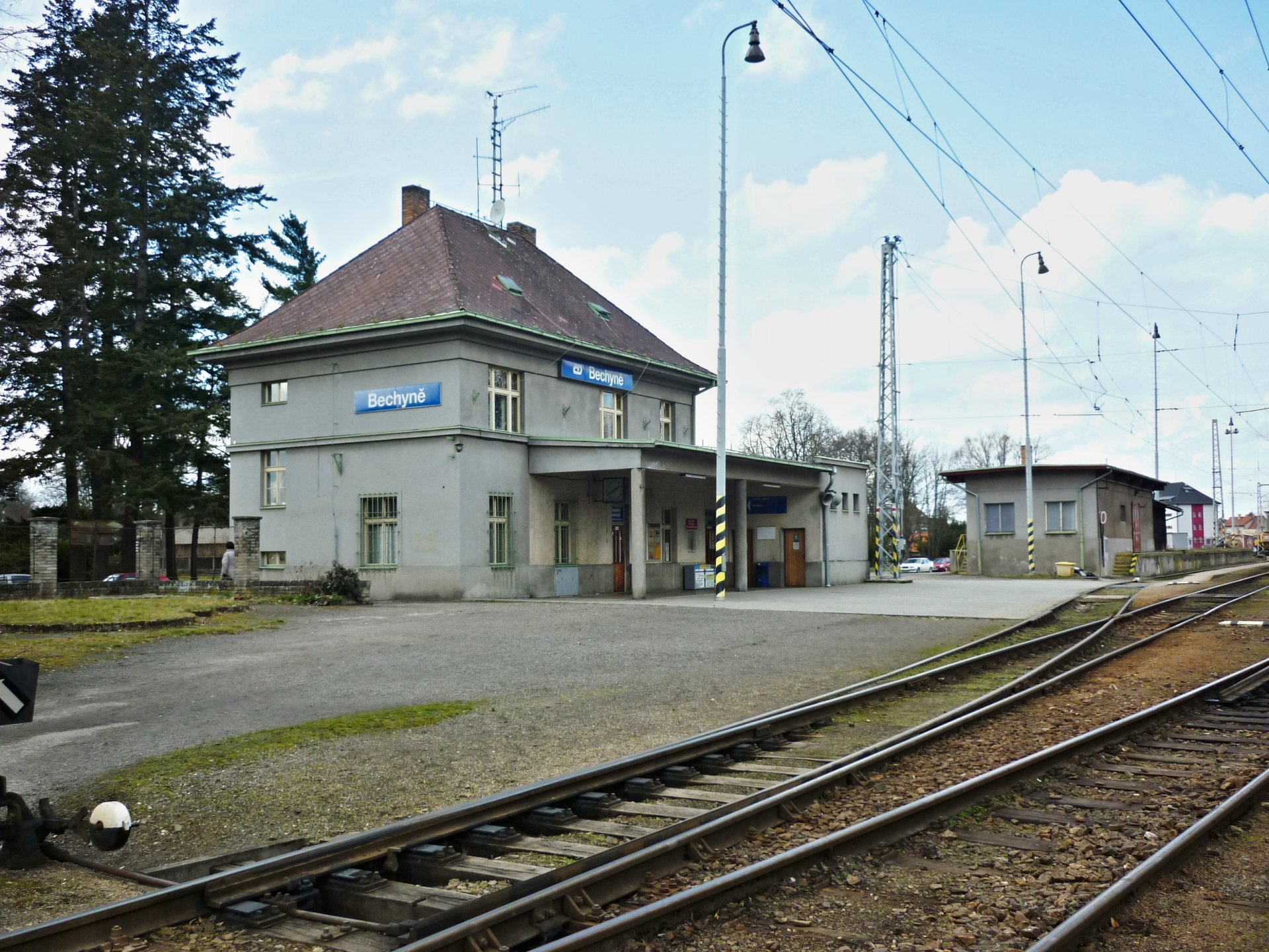 Bechyně železniční stanice(2)